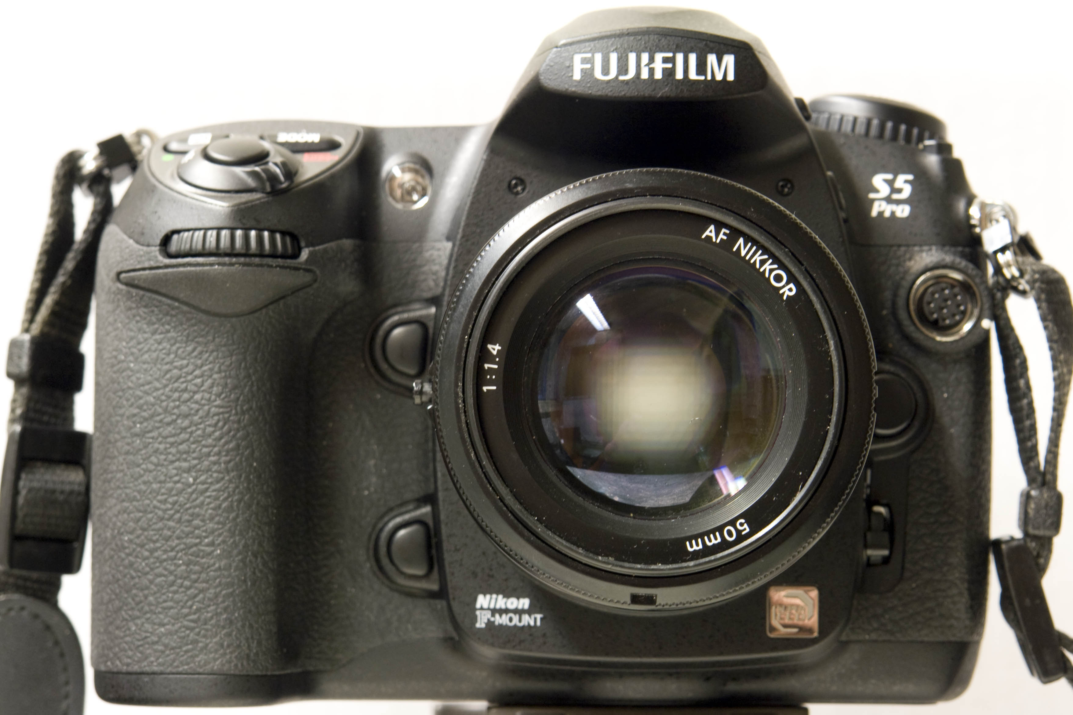 Fujifilm FinePix S5 Pro and AF-Nikkor 50 mm / 1,4